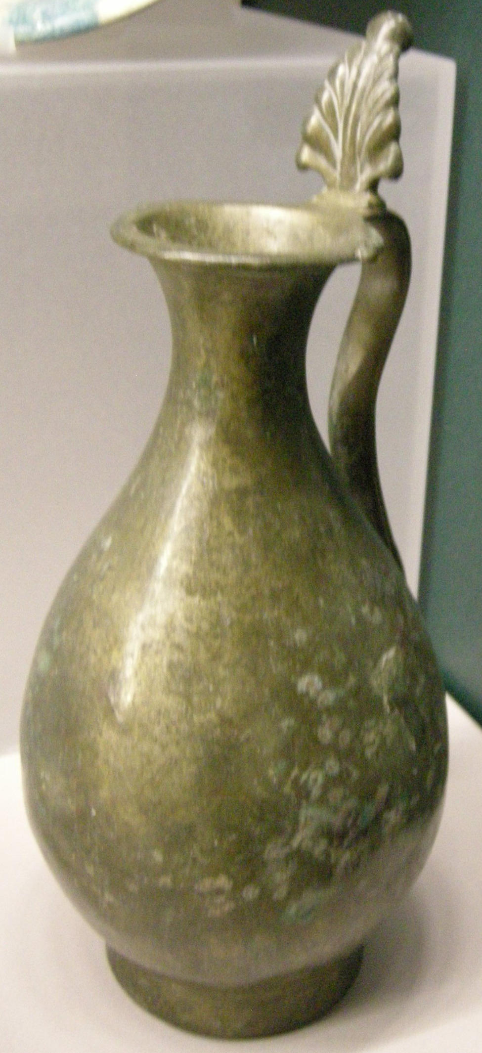 Iran, brocca di bronzo, viii-ix sec